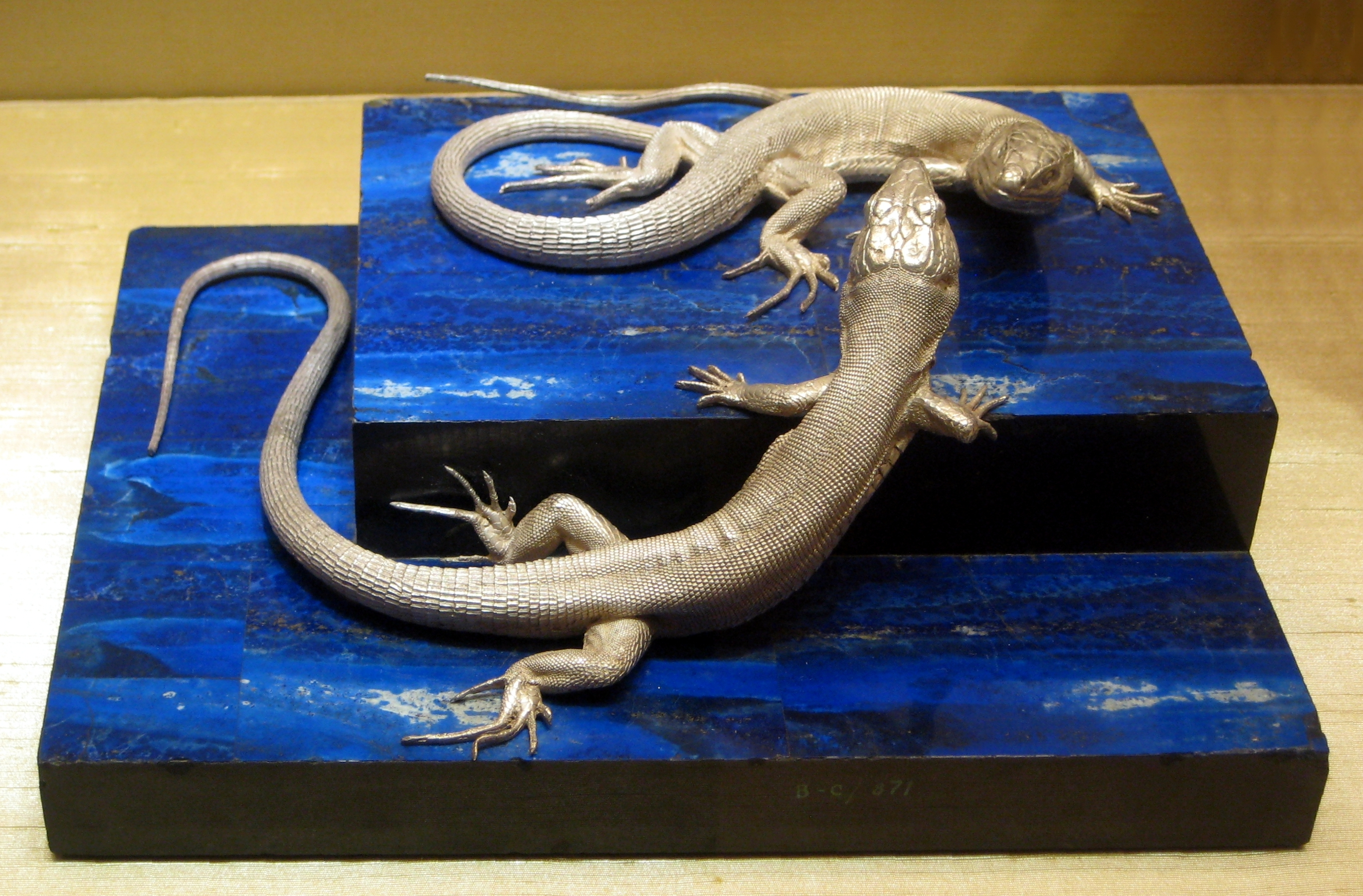 Пресс. СПб, не ранее 1885. Фирма Фаберже. Байкальский ляпис-лазурит, серебро. Петергоф. Гостиная вдовствующей императрицы Марии Федоровне.